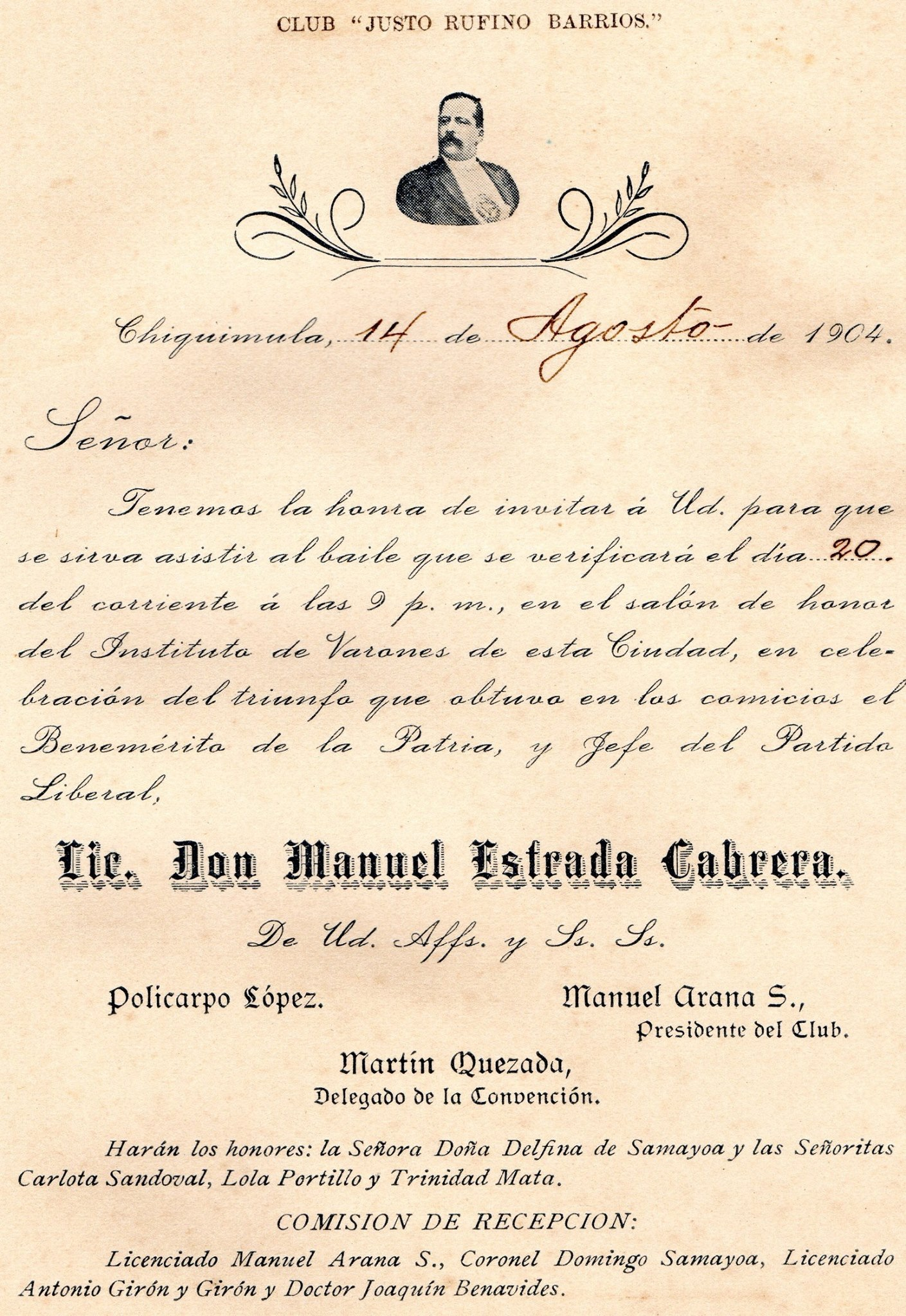 Invitación a participar en el baile de celebración de la reelección de Manuel Estrada Cabrera en 1904.